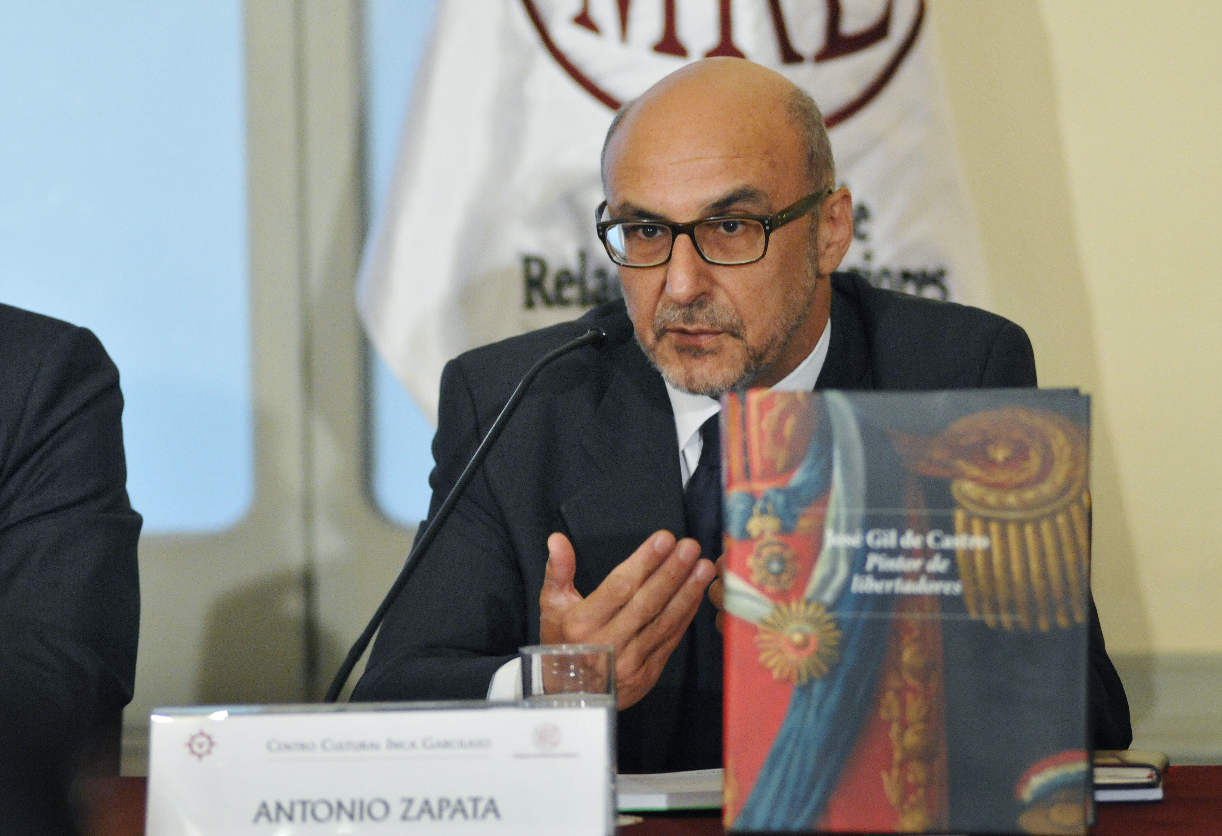 Gastón Antonio Zapata Velasco, historiador peruano